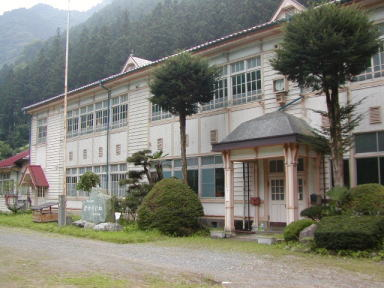 埼玉県秩父市大滝4783番地に移転した光の村養護学校秩父自然学園